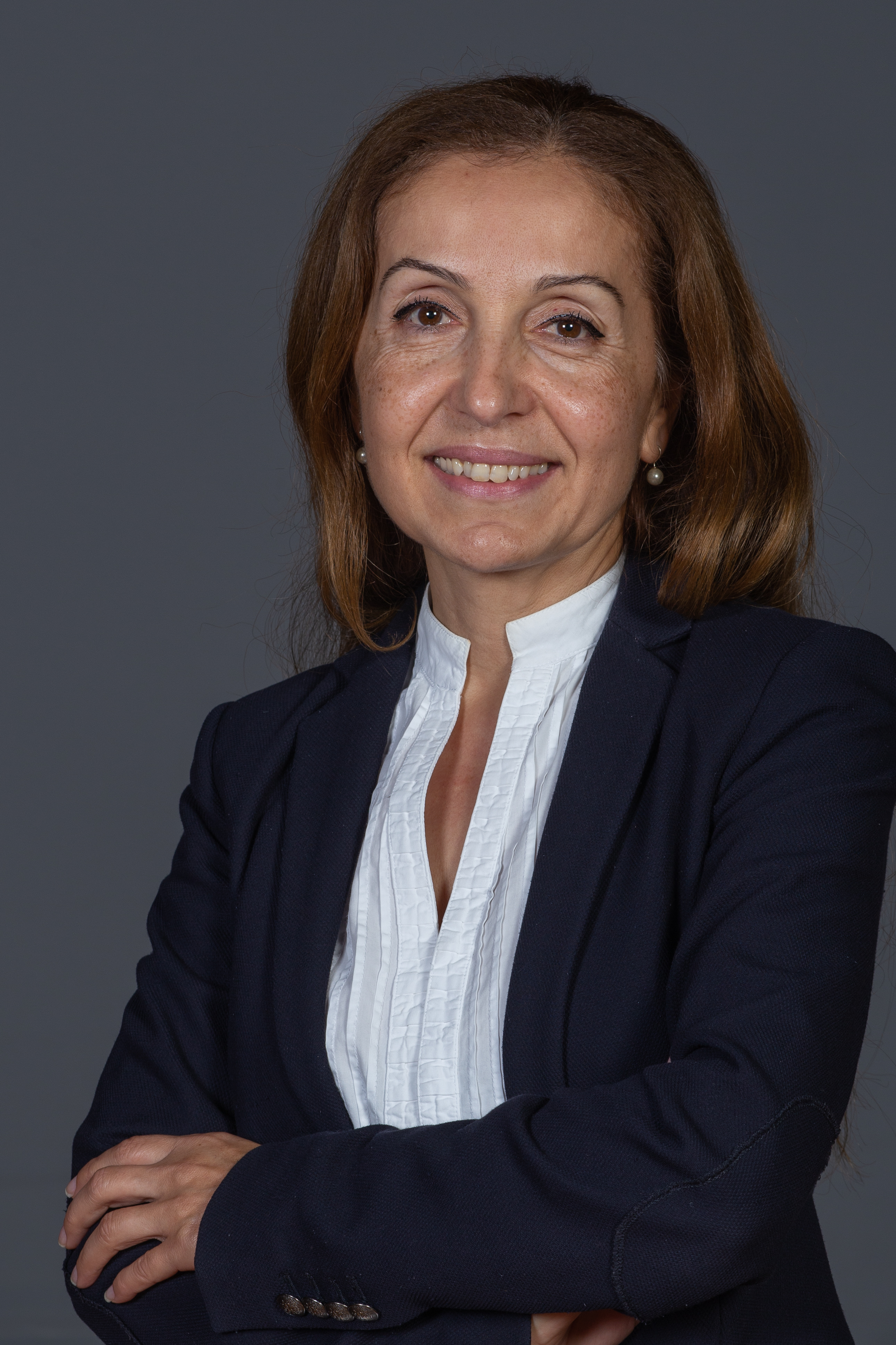 Abgeordnete(r) der Bürgerschaft der Freien und Hansestadt Hamburg Filiz Demirel